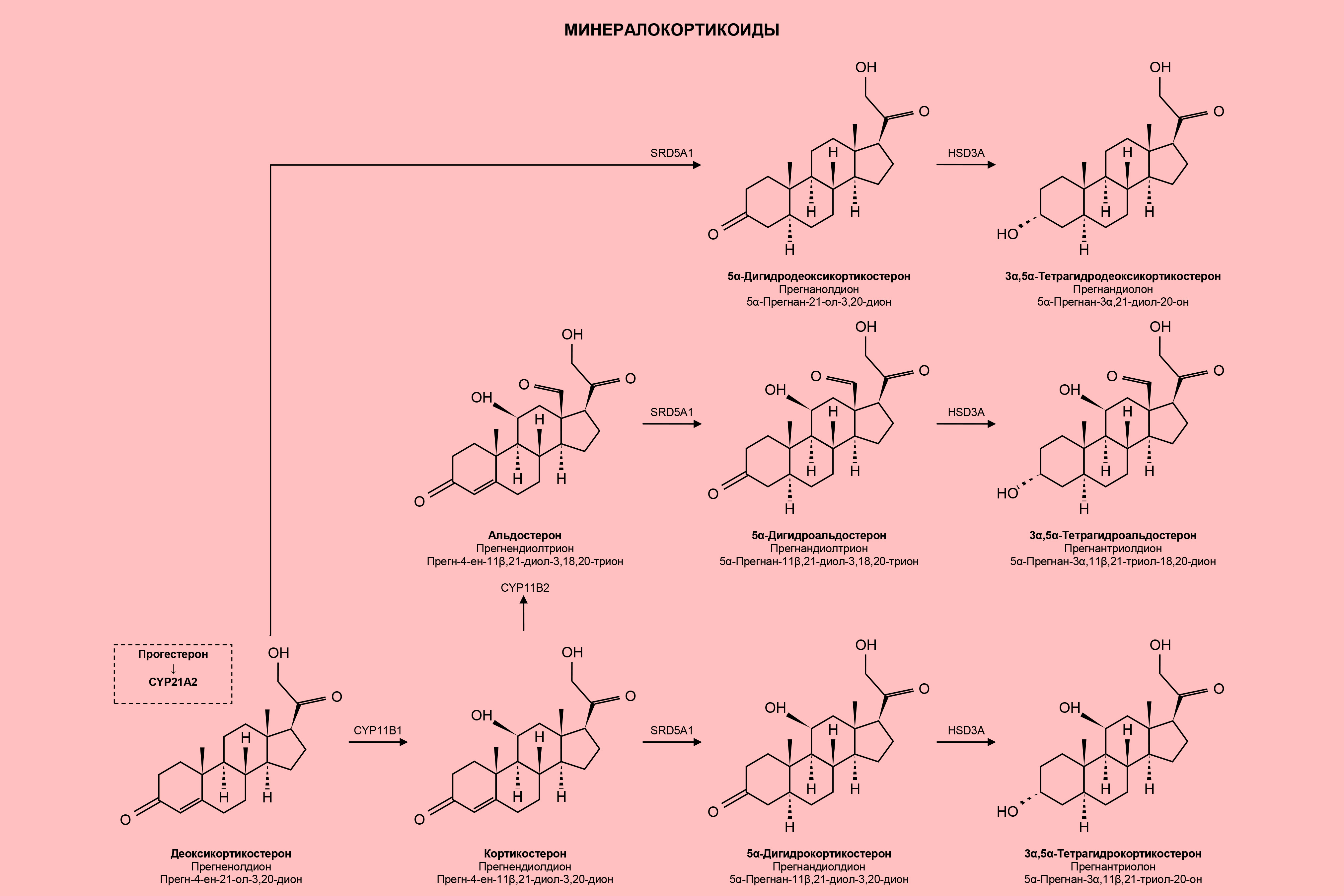 Синтез минералокортикоидов